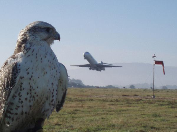 Halcón utilizado para dispersión de aves.